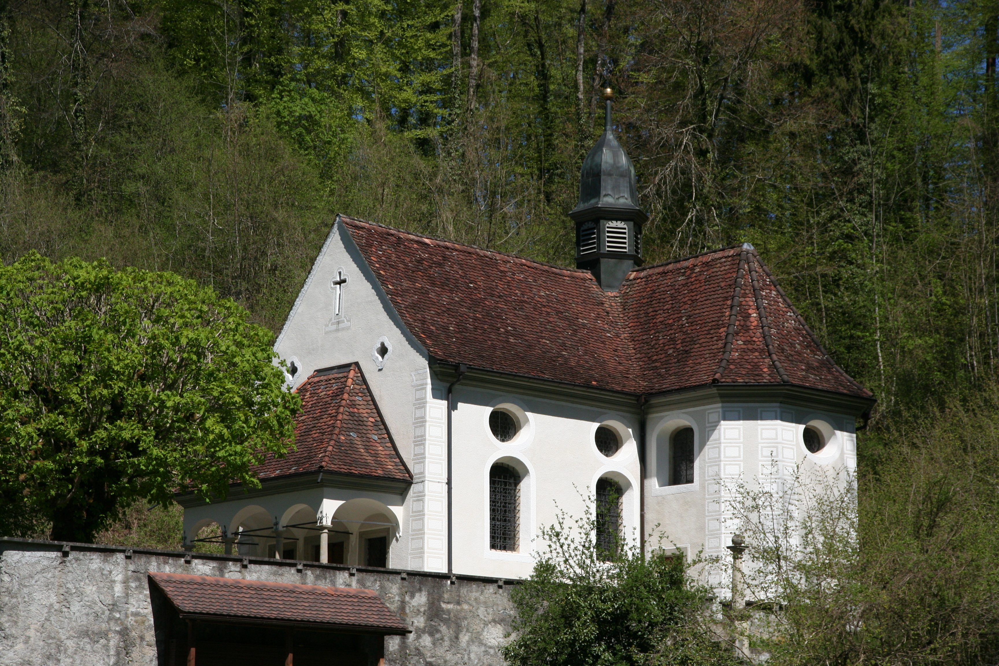 Wallfahrskapelle Jonental